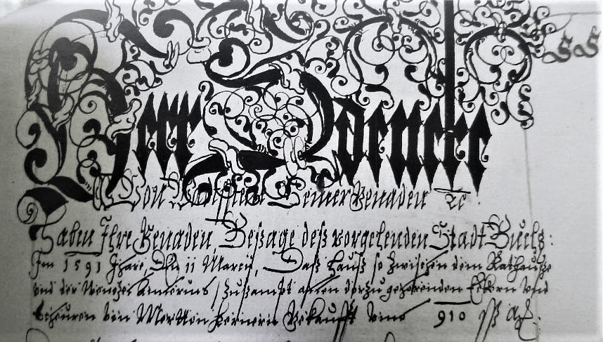 Herr Zdenek von Waldsstein in Initialen von H u Z. von Perlen eingeschnürte Buchstaben